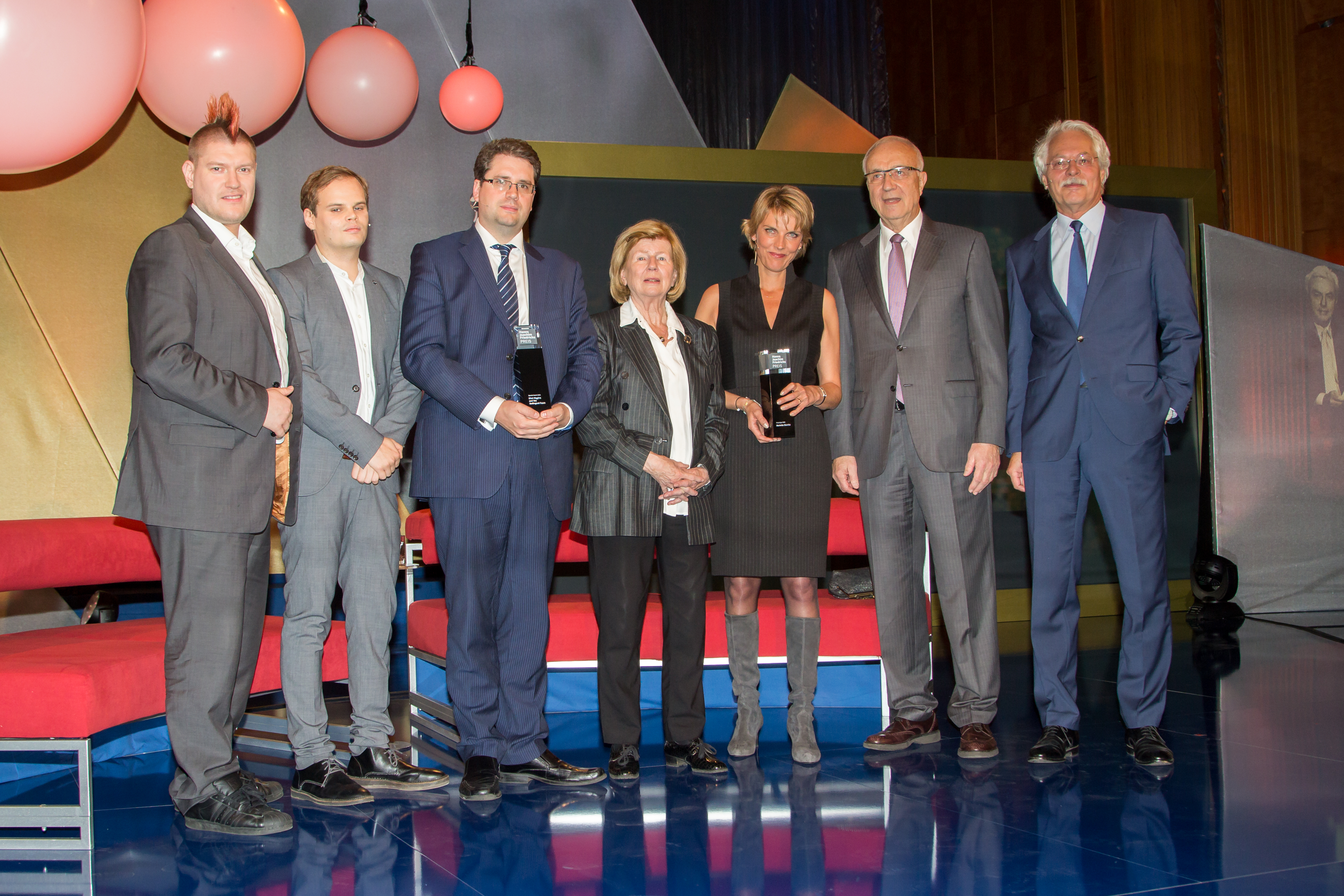 Verleihung des Hanns-Joachim-Friedrichs-Preises 2015 in Köln: v.l.n.r.: Sascha Lobo, Andreas Spinrath , Eliot Higgins, Ilse Friedrich, Marietta Slomka, Fritz Pleitgen, Thomas Roth